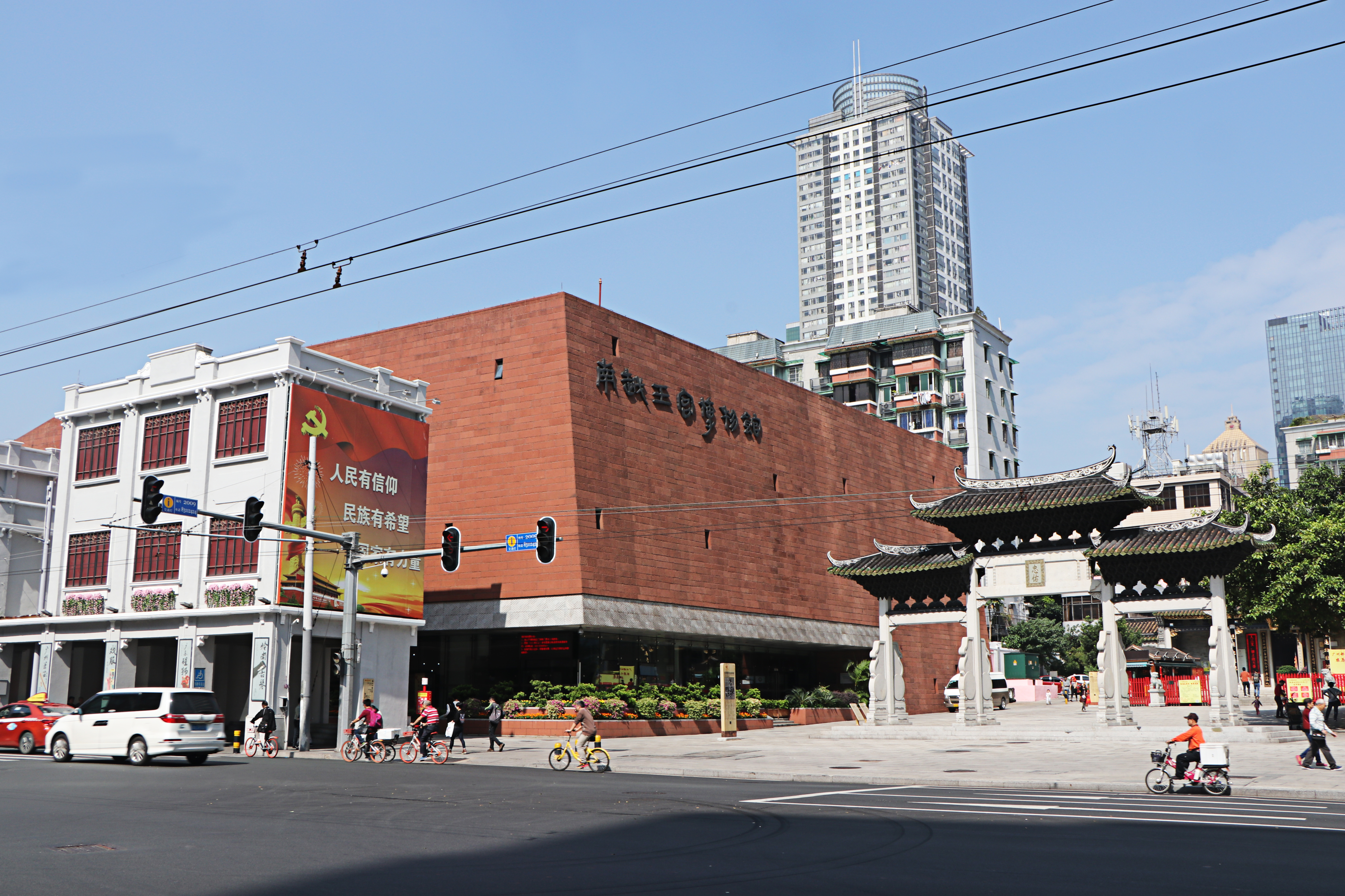 南越王宮博物館以及广州城隍庙牌坊